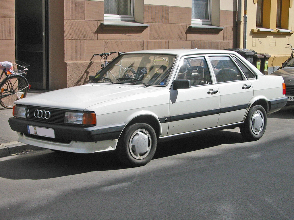 Audi 80 (B2) Facelift